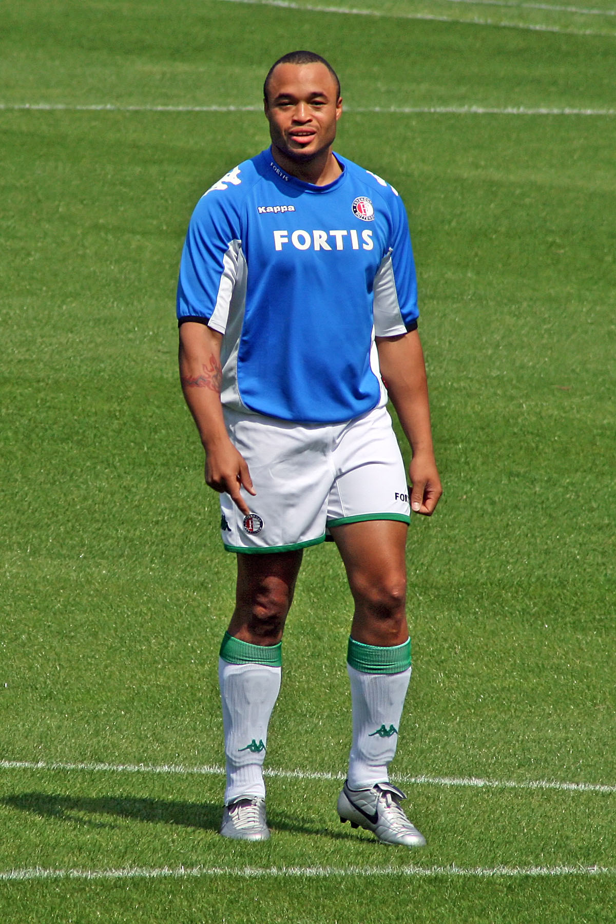 Don Diego Poeder Feyenoord 100 Years Balloon